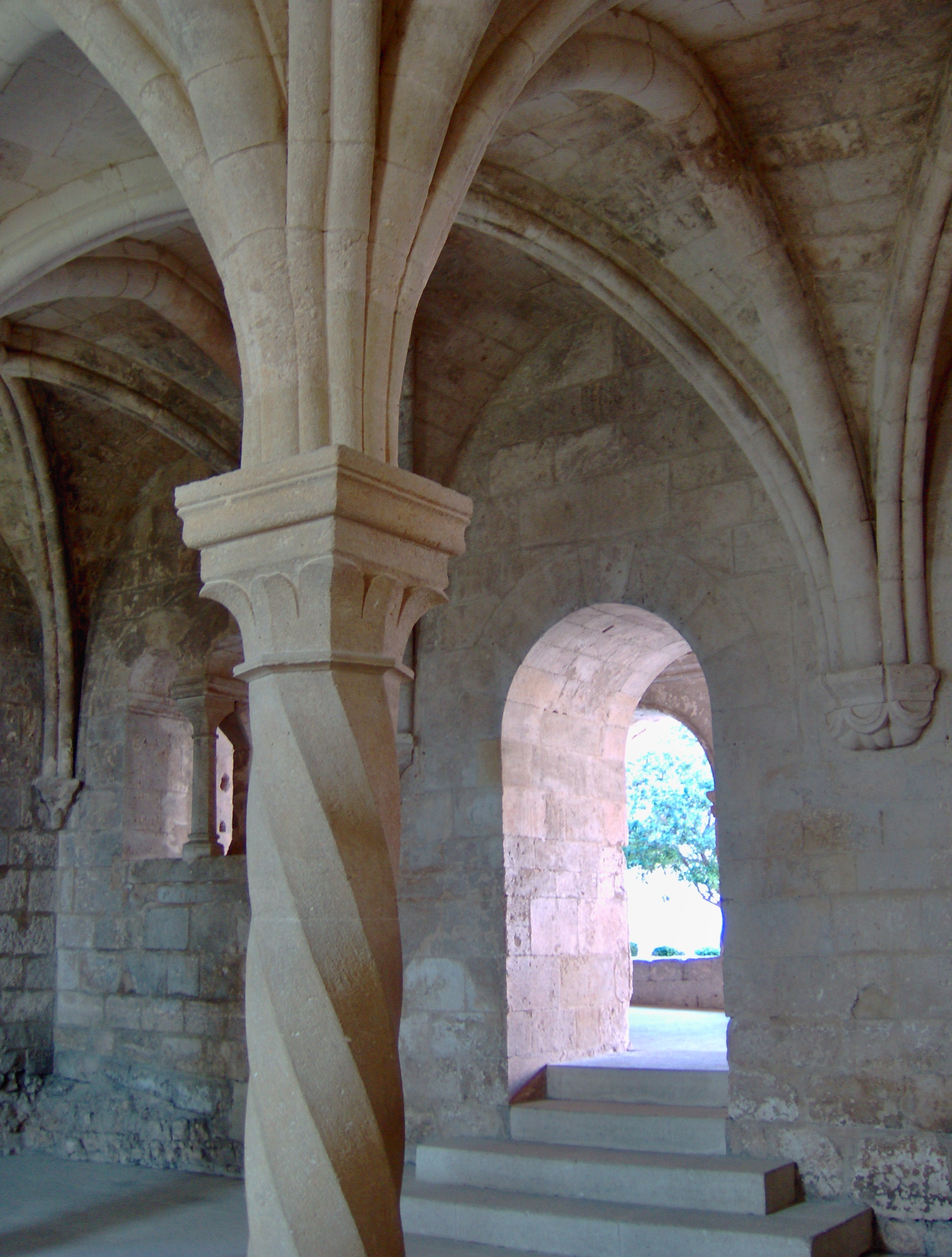 Salle capitulaire de l'abbaye cistercienne de Silvacane.